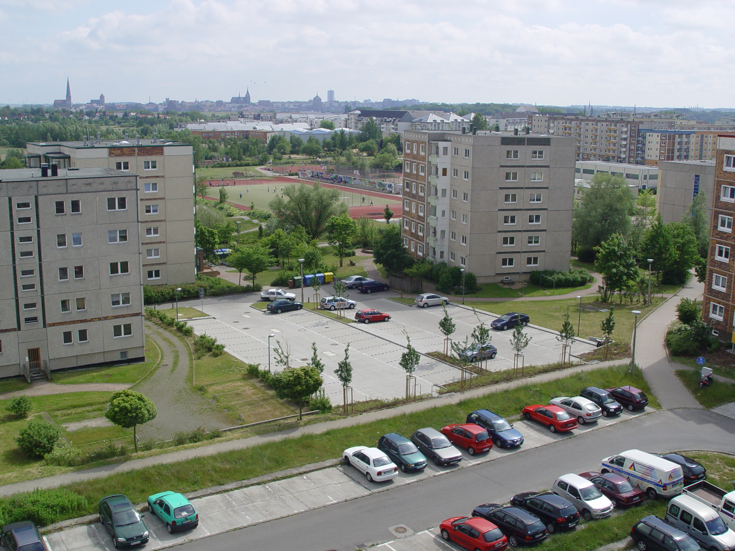 Toitenwinkel mit den 3 großen Kirchen Rostocks im Hintergrund